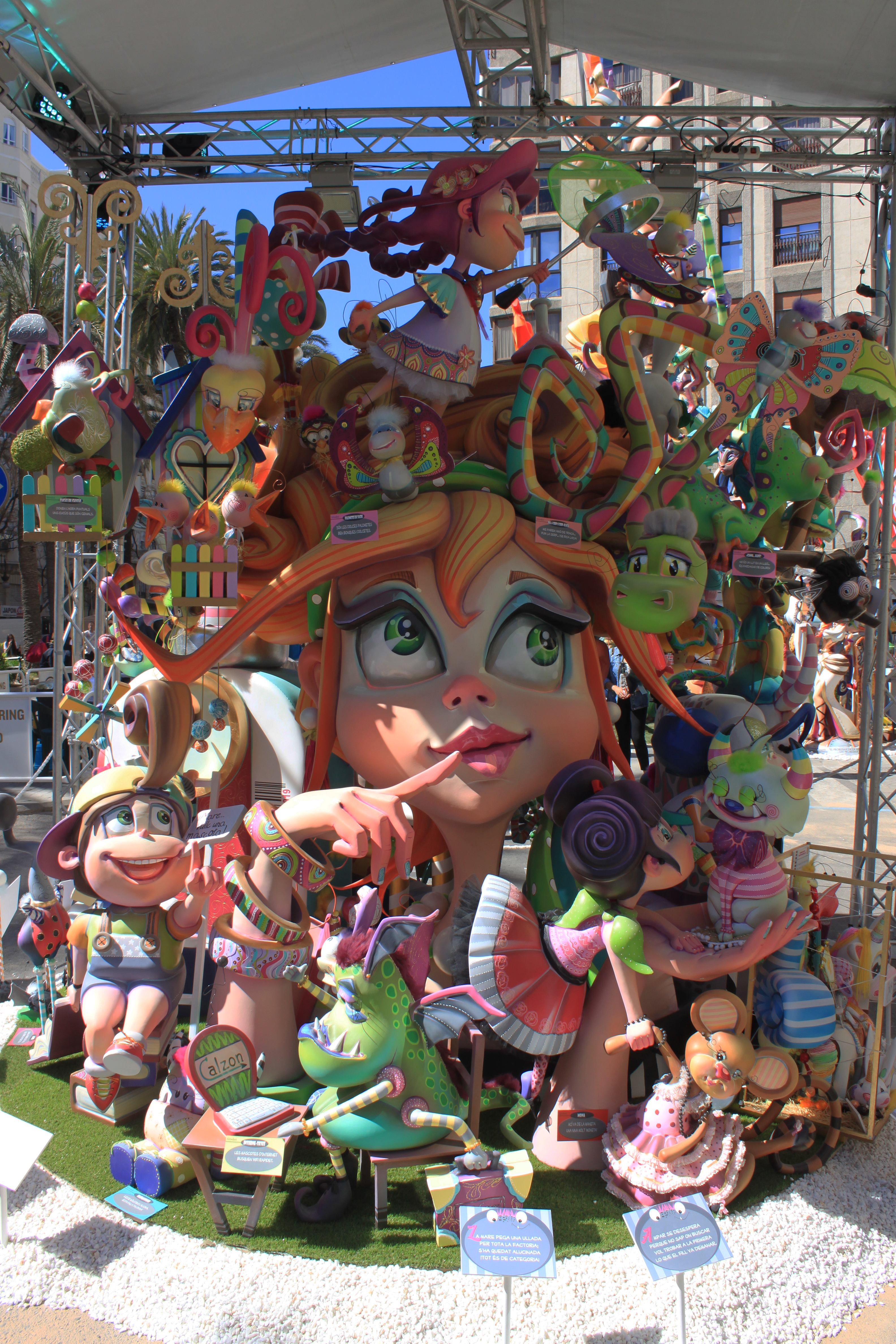 Falla Reino de Valencia-Duque de Calabria de 2019. Valencia, Comunidad Valenciana, España.